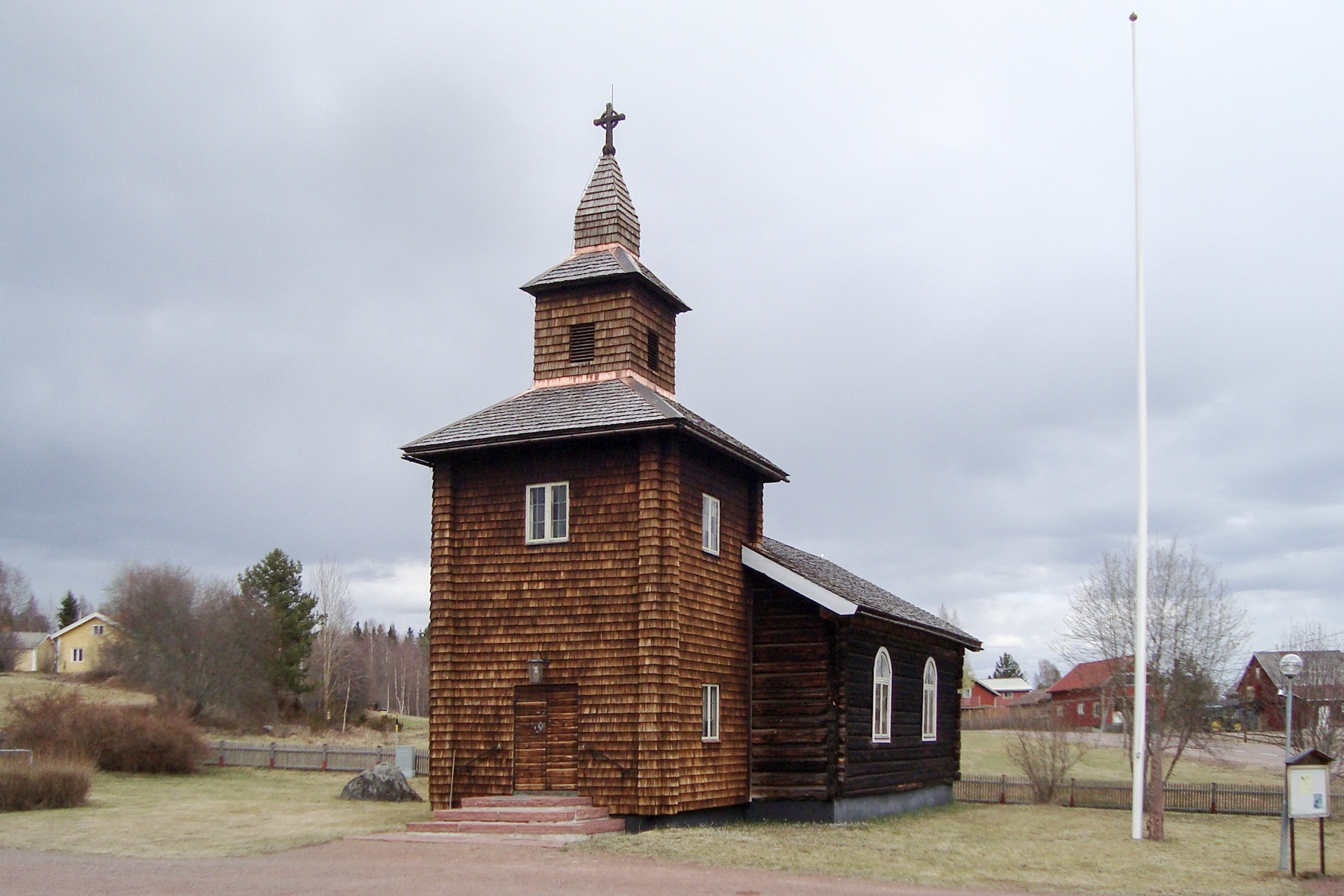 Åsens kapell (Chapel of Åsen), Åsen, Älvdalen Municipality, Sweden.